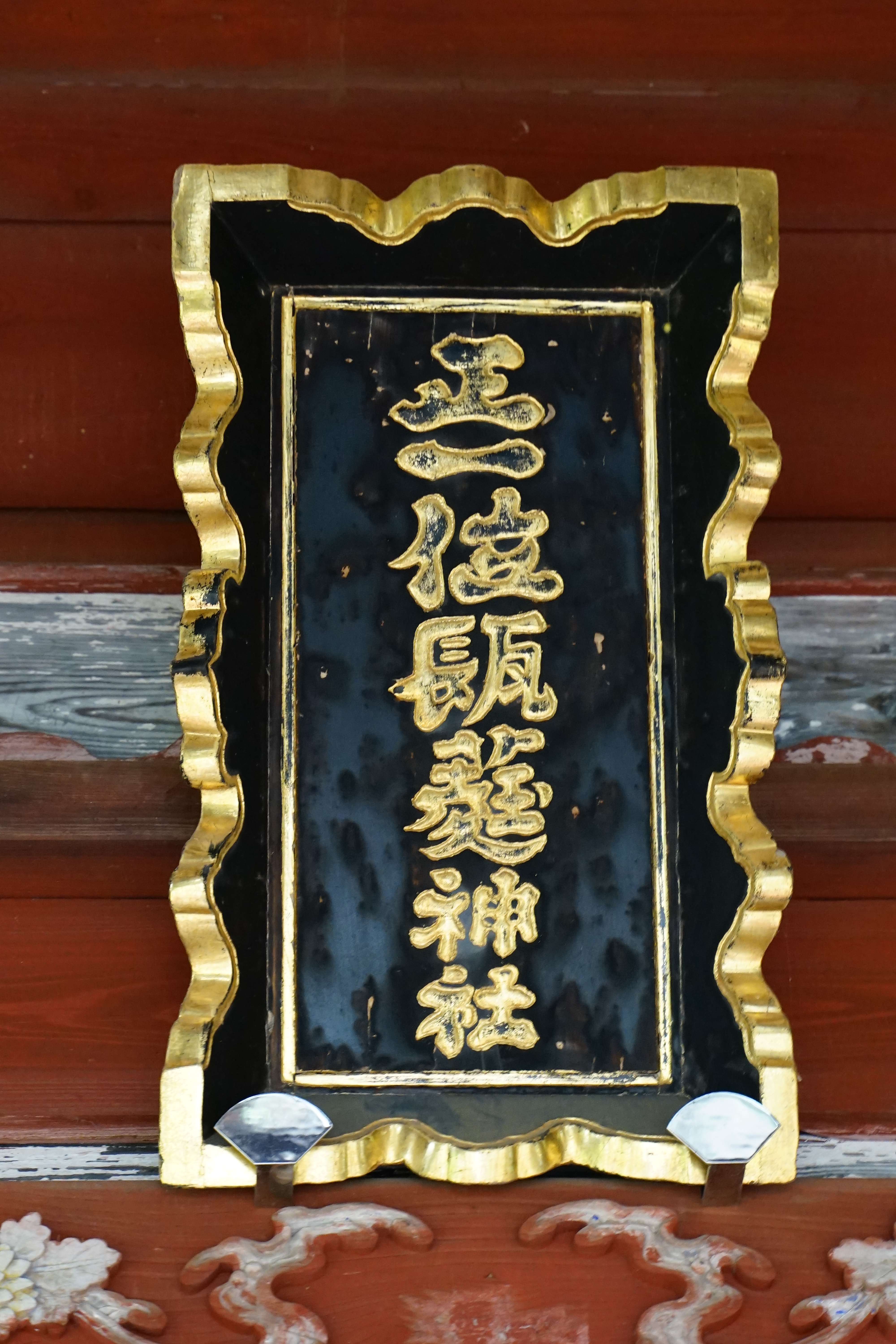 みか神社（埼玉県美里町）拝殿の扁額